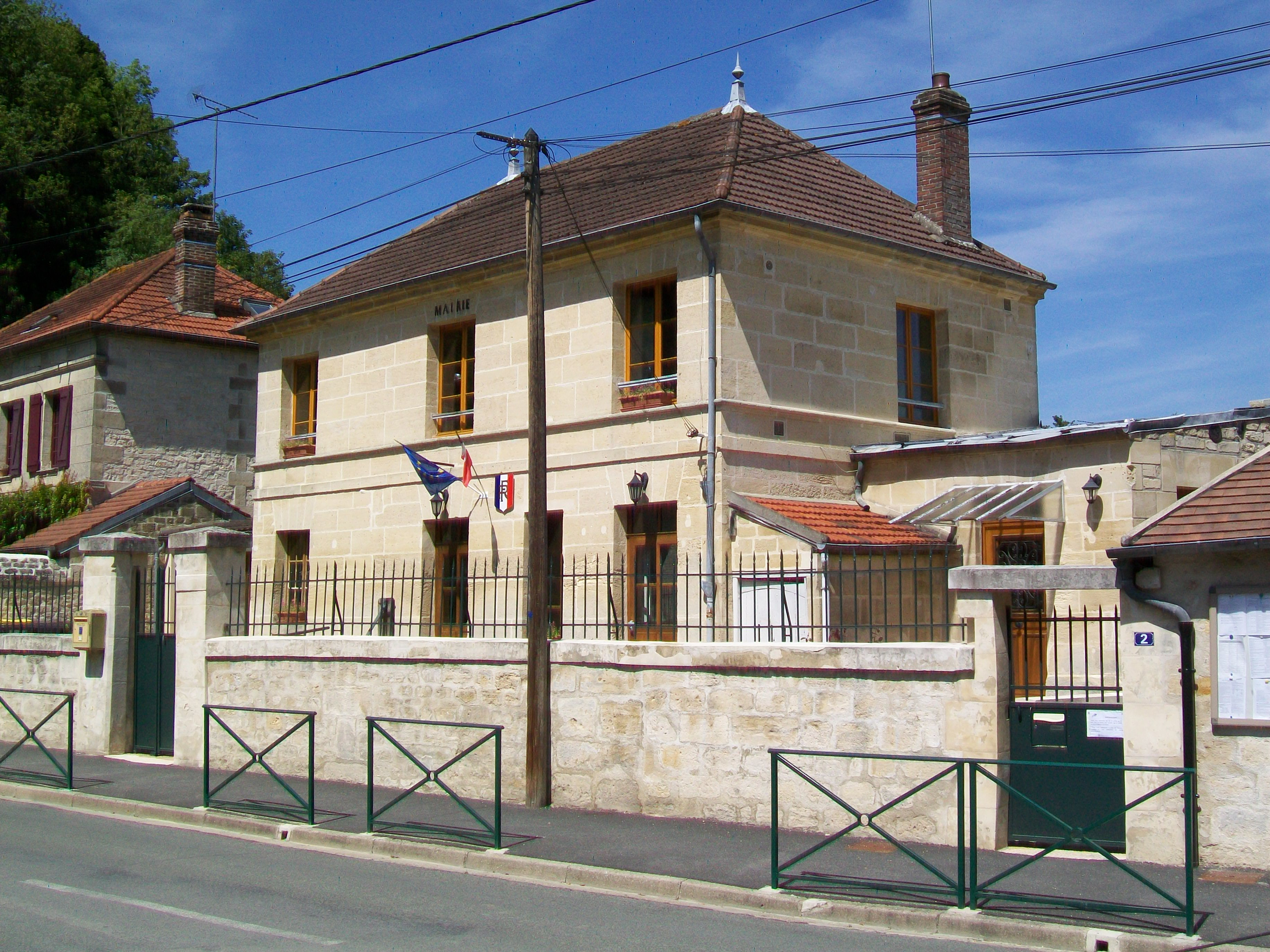 La mairie-école, rue du Petit-Marais.